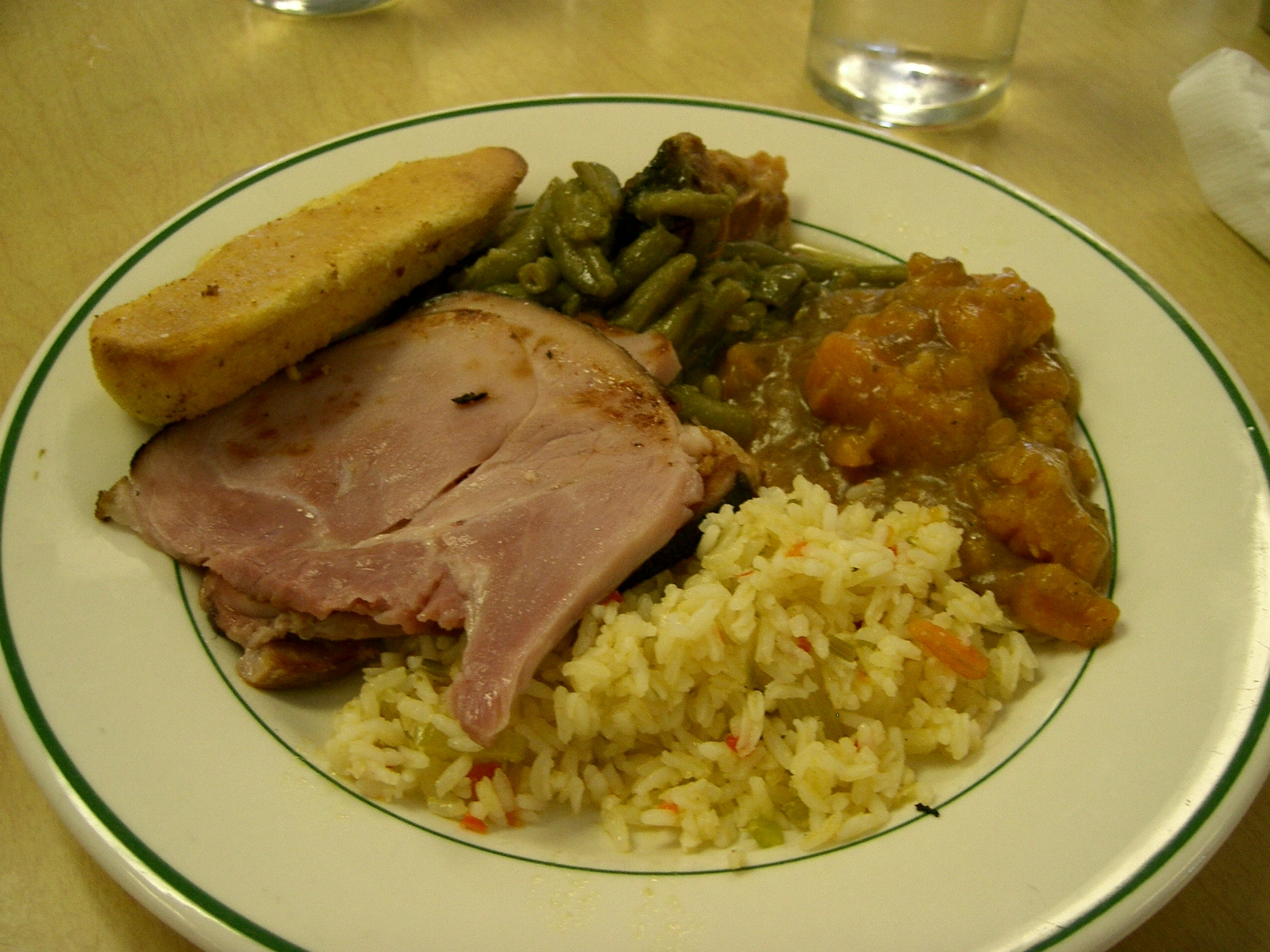 Cuisine cajun (Louisiane)- travers de porc et jambalaya self made PRA